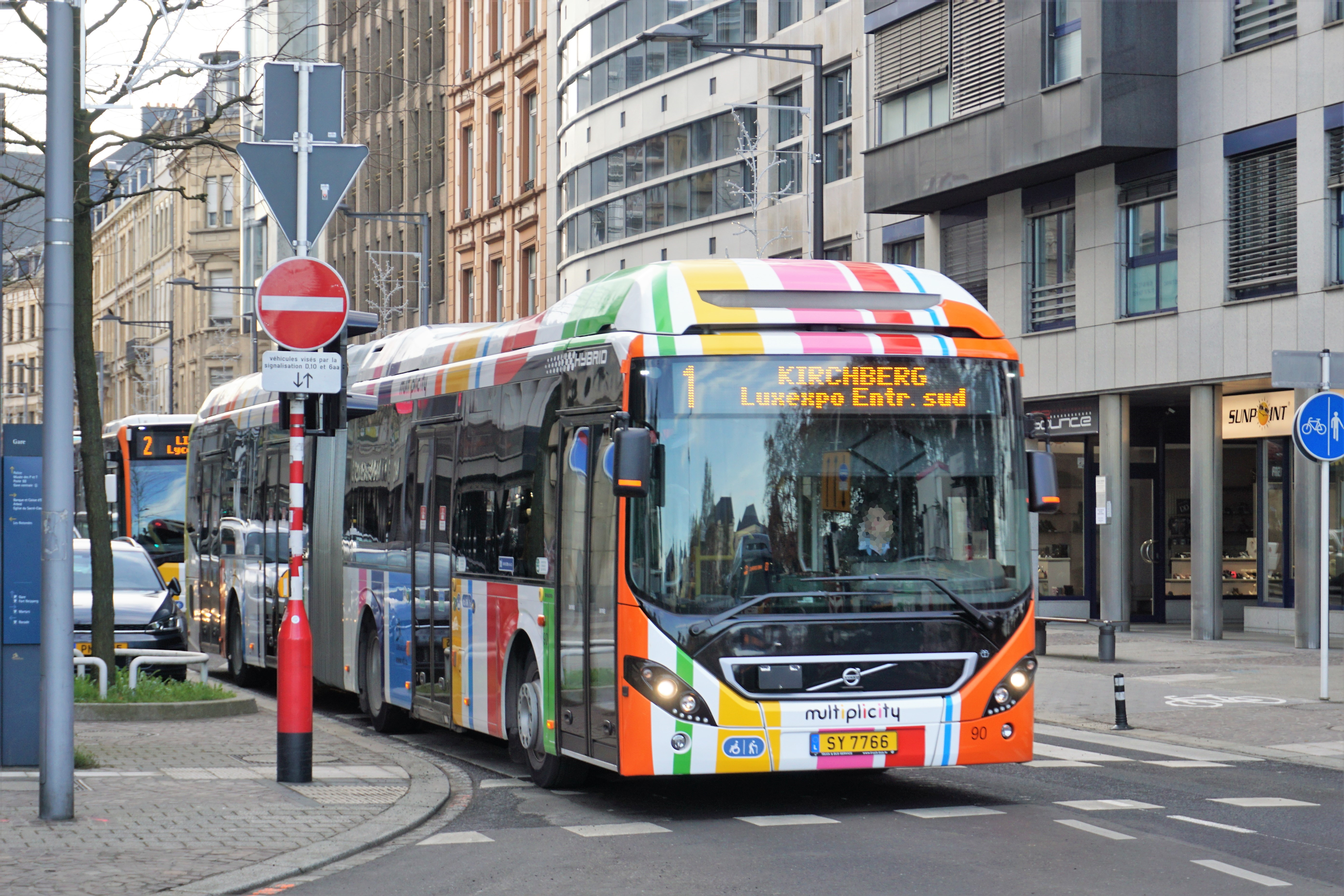 Luxembourg, bus AVL 90 (#SY7766) sur une ligne 1 dans l'avenue de la Gare en direction de Kirchberg.